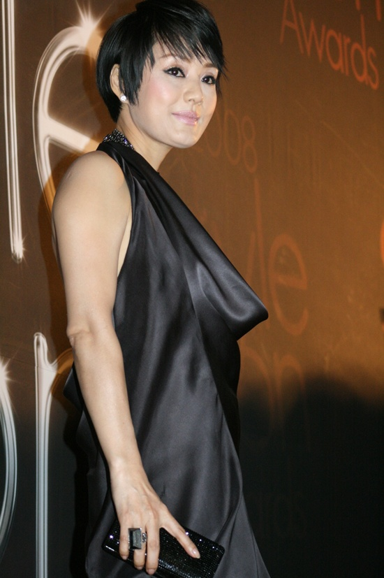 2008 스타일 아이콘 어워즈